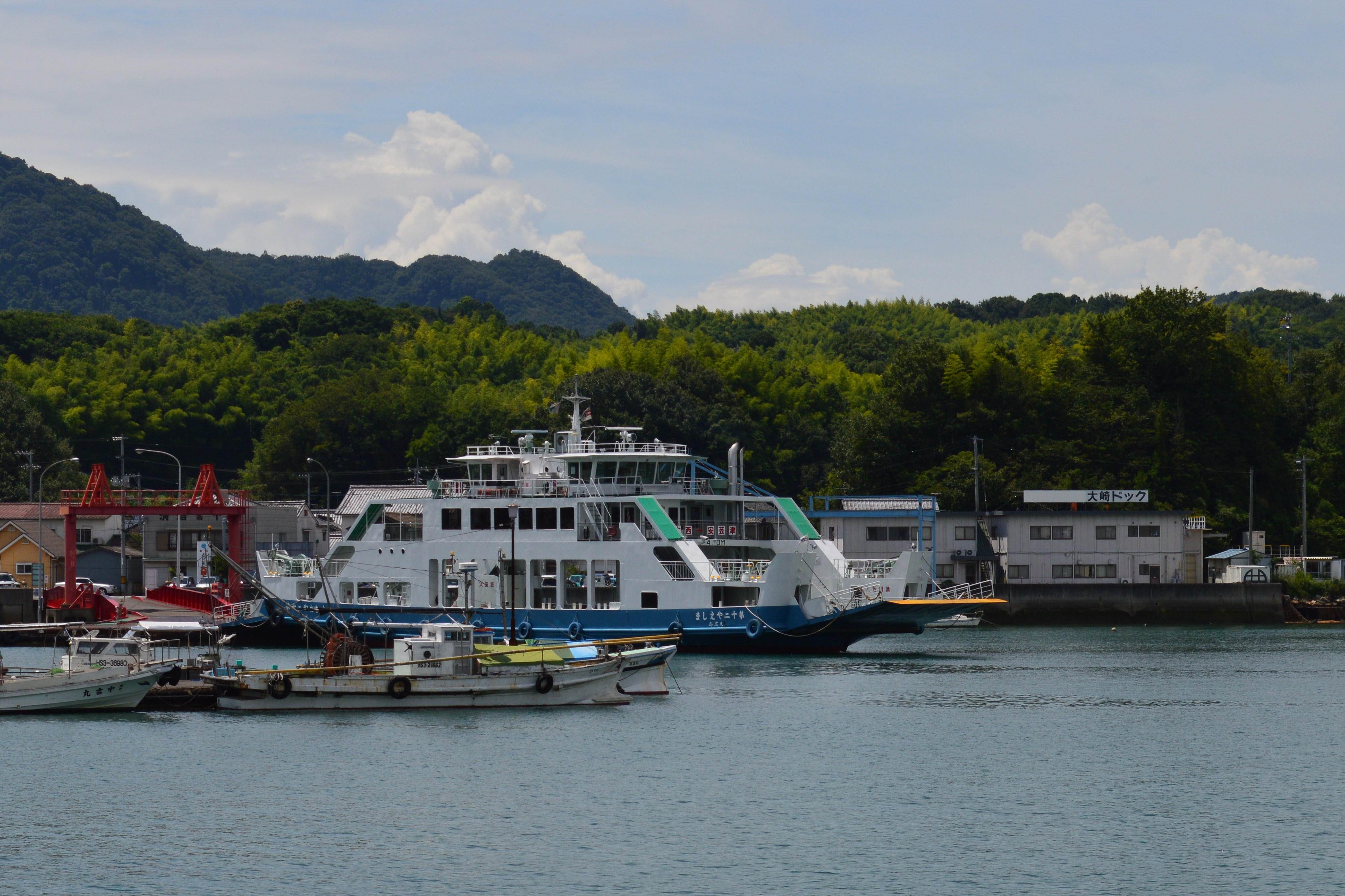 広島県の大崎上島にある大西港